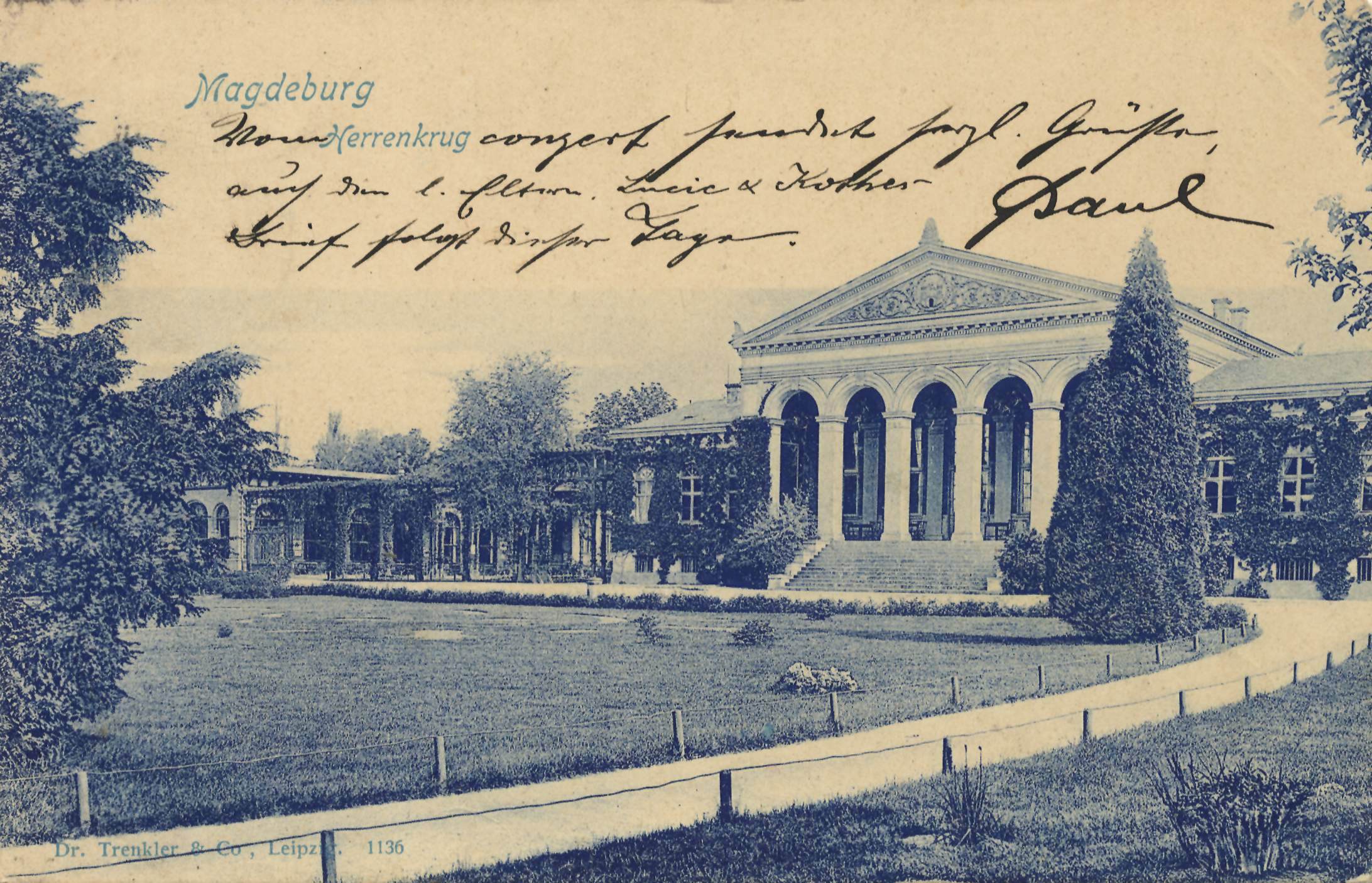 Herrenkrug